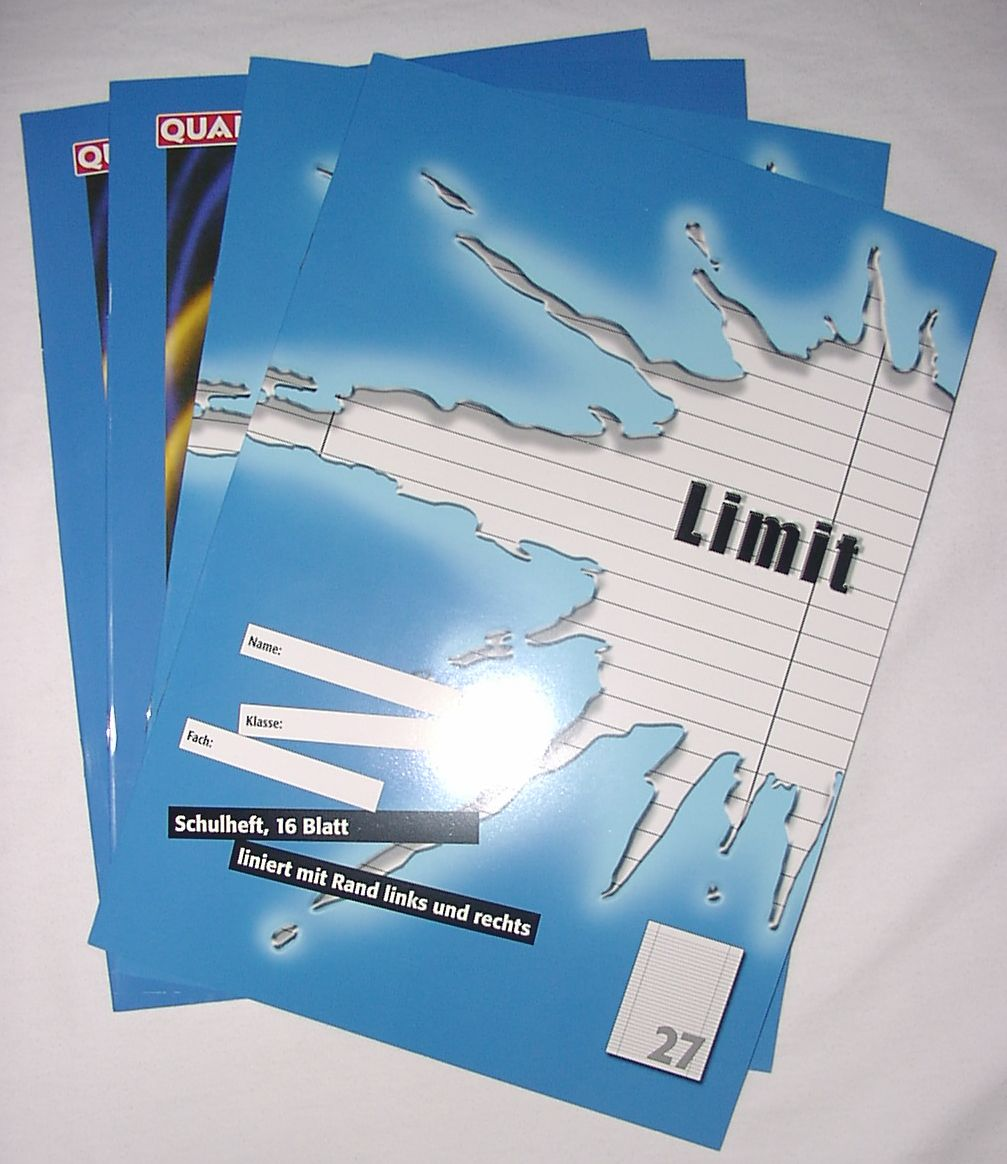 Vier Schulhefte (Nr 28 und 27)